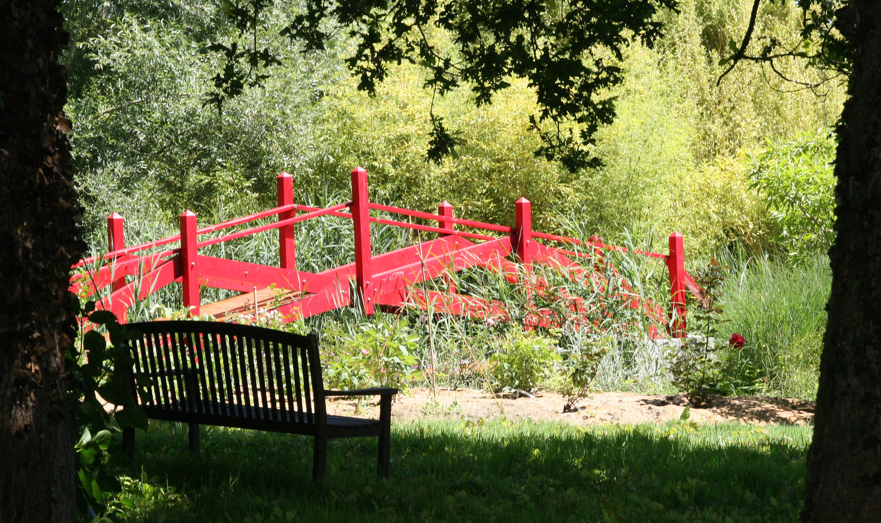 Reconstitution du Pont Moulin Joly à partir d'une gravure représentant une vue prise dans l'ancien jardin de Claude-Henri Watelet, créateur du premier jardin anglo-chinois en France